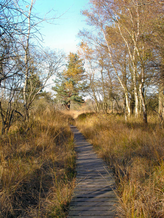 Hohes Venn, Belgien, im Herbst